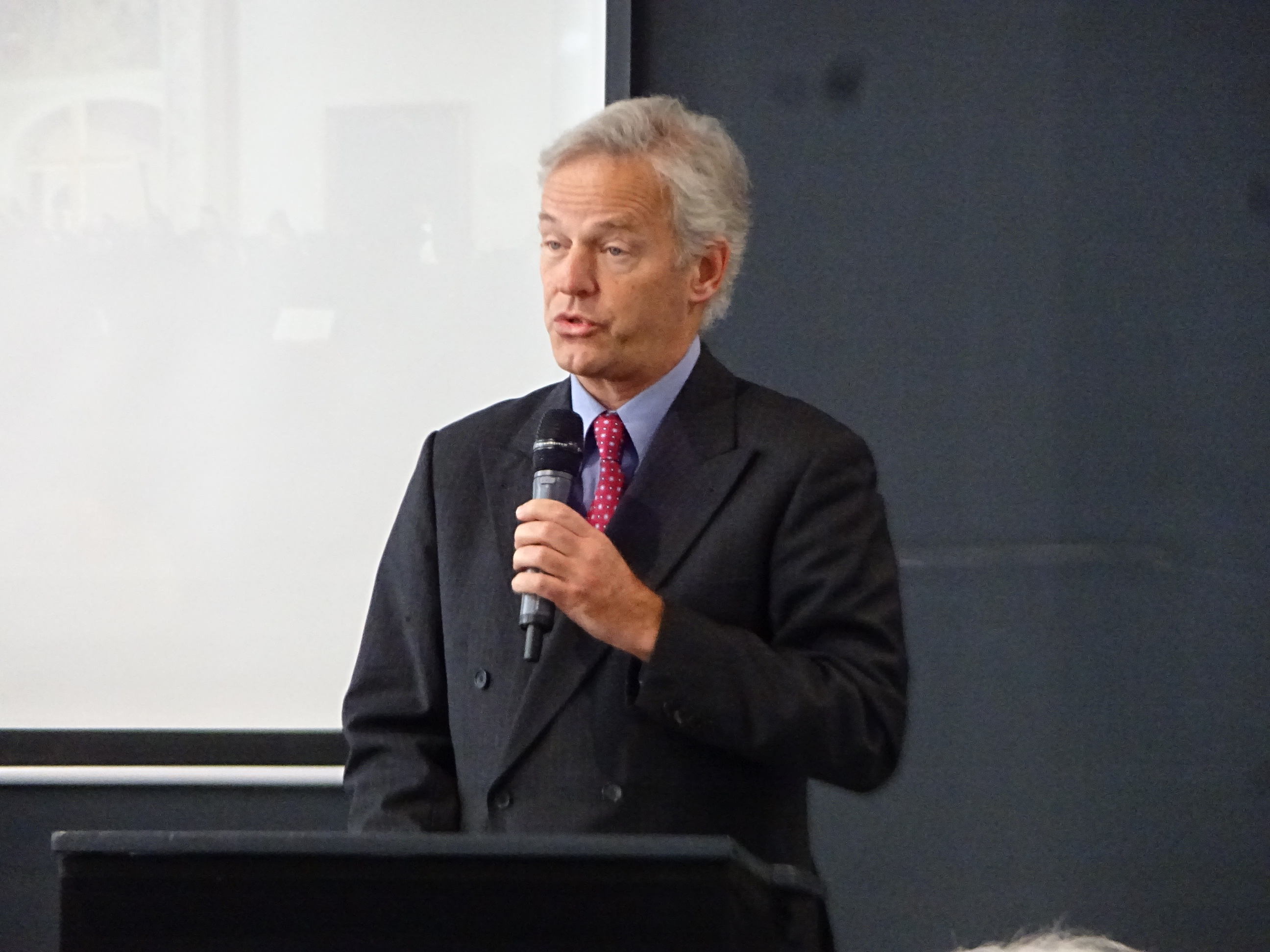 Lénart de Regt, prezentacja Biblii Ekumenicznej w Muzeum Etnograficznym w Warszawie 2018-03-17